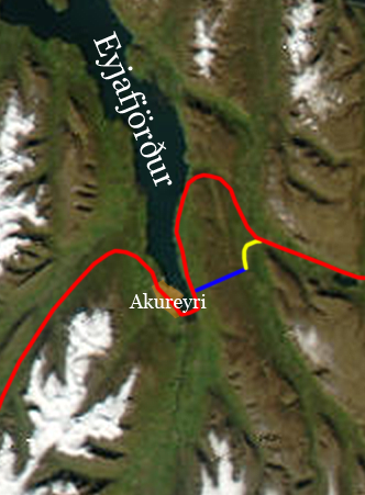 Staðsetning Vaðlaheiðarganga.